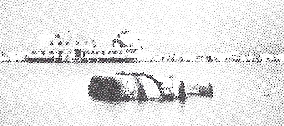 מחפר ימי שהוטבע בנמל אלכסנדריה על ידי צוללי שייטת 13 9 ביוני 1967